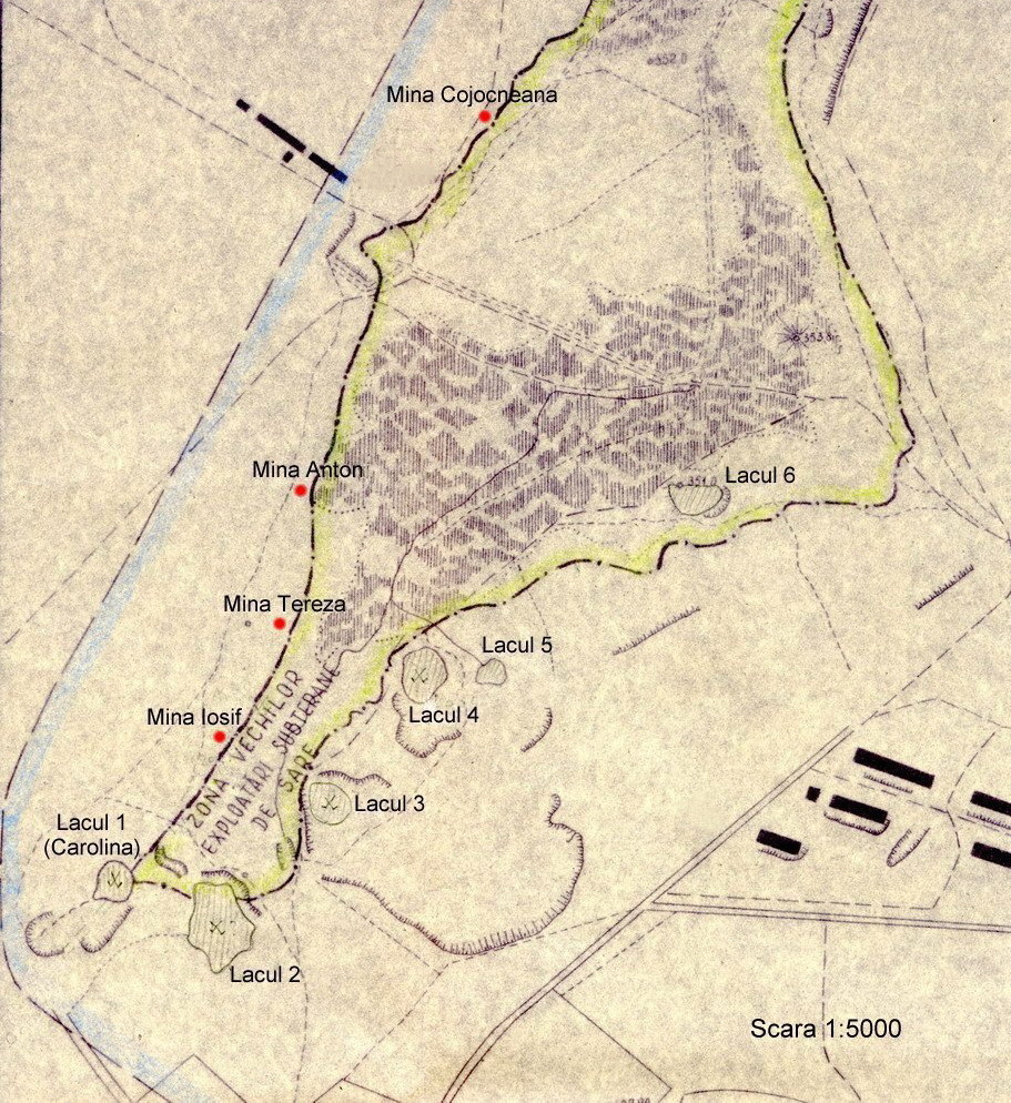 Zona lacurilor de la Durgău şi amplasamentul vechilor mine de la Salina Turda (1950)